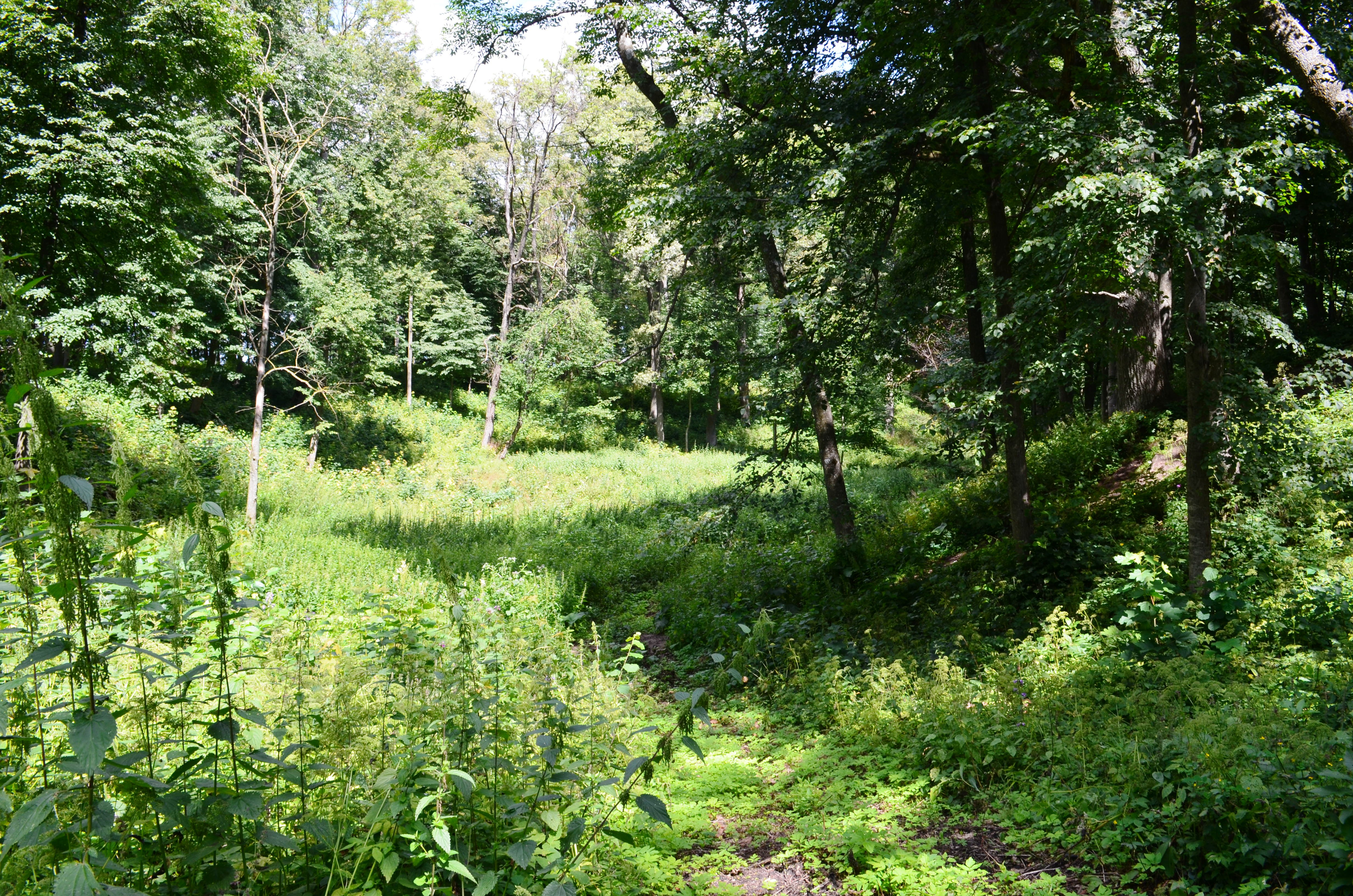 Čičinsko kalnas, Upytė, Panevėžio raj.